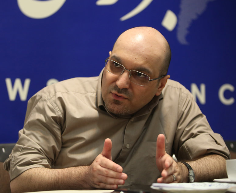 محمدمنصور هاشمی